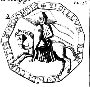 Raimund Burgundský